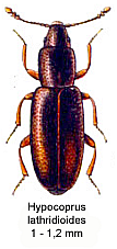 Hypocoprus lathridioides